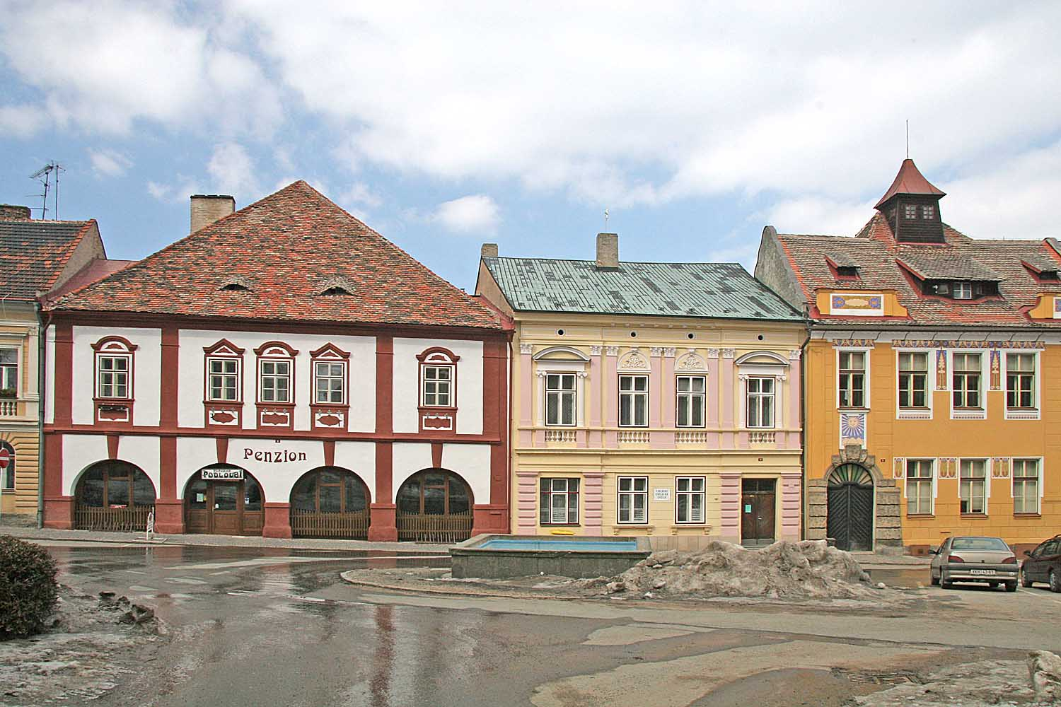 Opočno, domy na náměstí u zámku, district Hradec Králové, Czech Republic autor: Prazak date: 23. 3. 2006